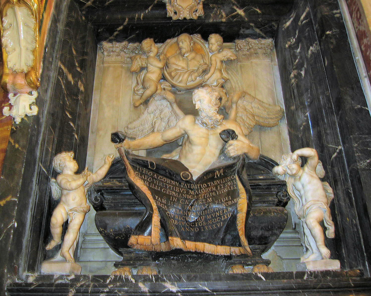 Ercole Ferrata - Monument to Giulio Del Corno. Gesù e Maria, Rome. Picture by Torvindus.